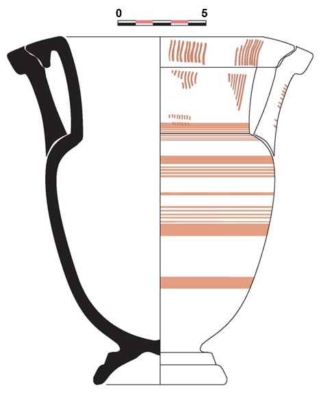 Ceramica iberica que imita al prototipo griego de la crátera de columnas. Aparecida en la excavación de la necrópolis ibérica de Los Campos de Gimeno, Enguera (Valencia). Usada como urna funeraria. Fechada en el s. IV a.C. por el ajuar con el que se acompañaba.